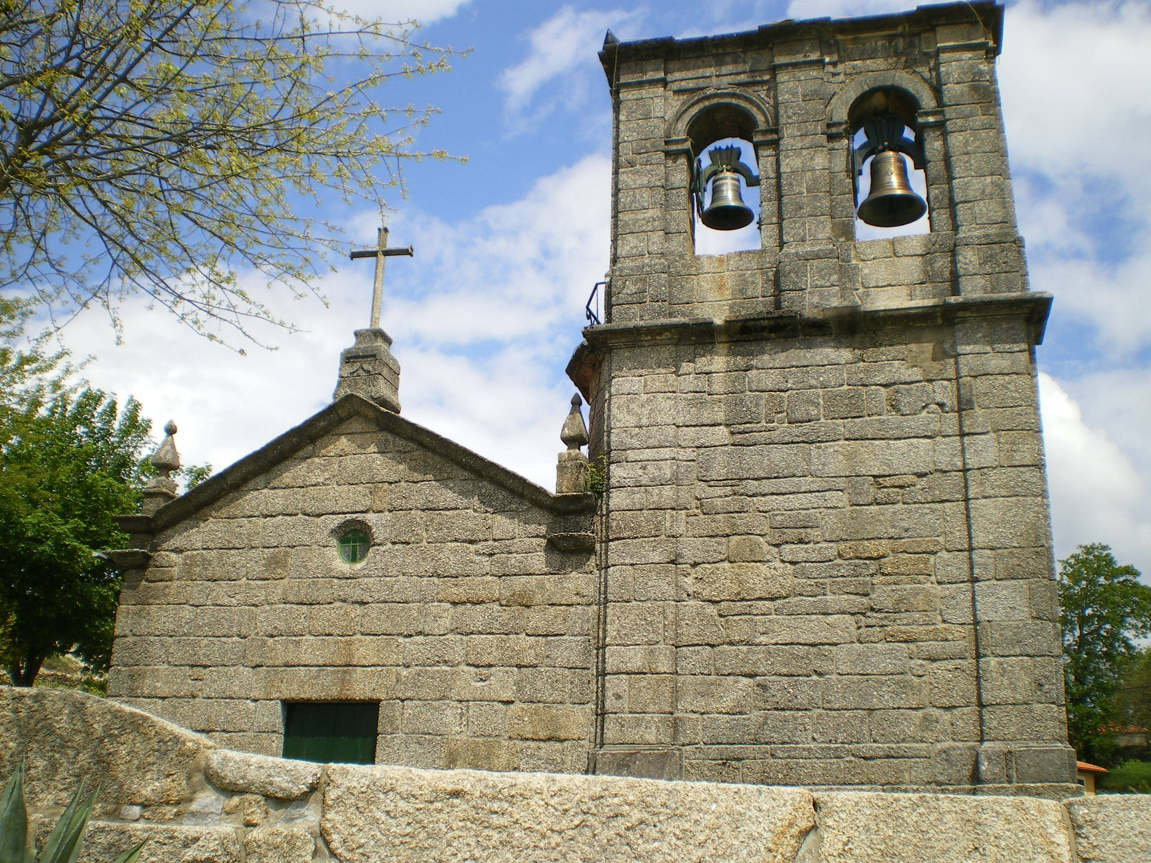 Aboim Church in Fafe, Portugal